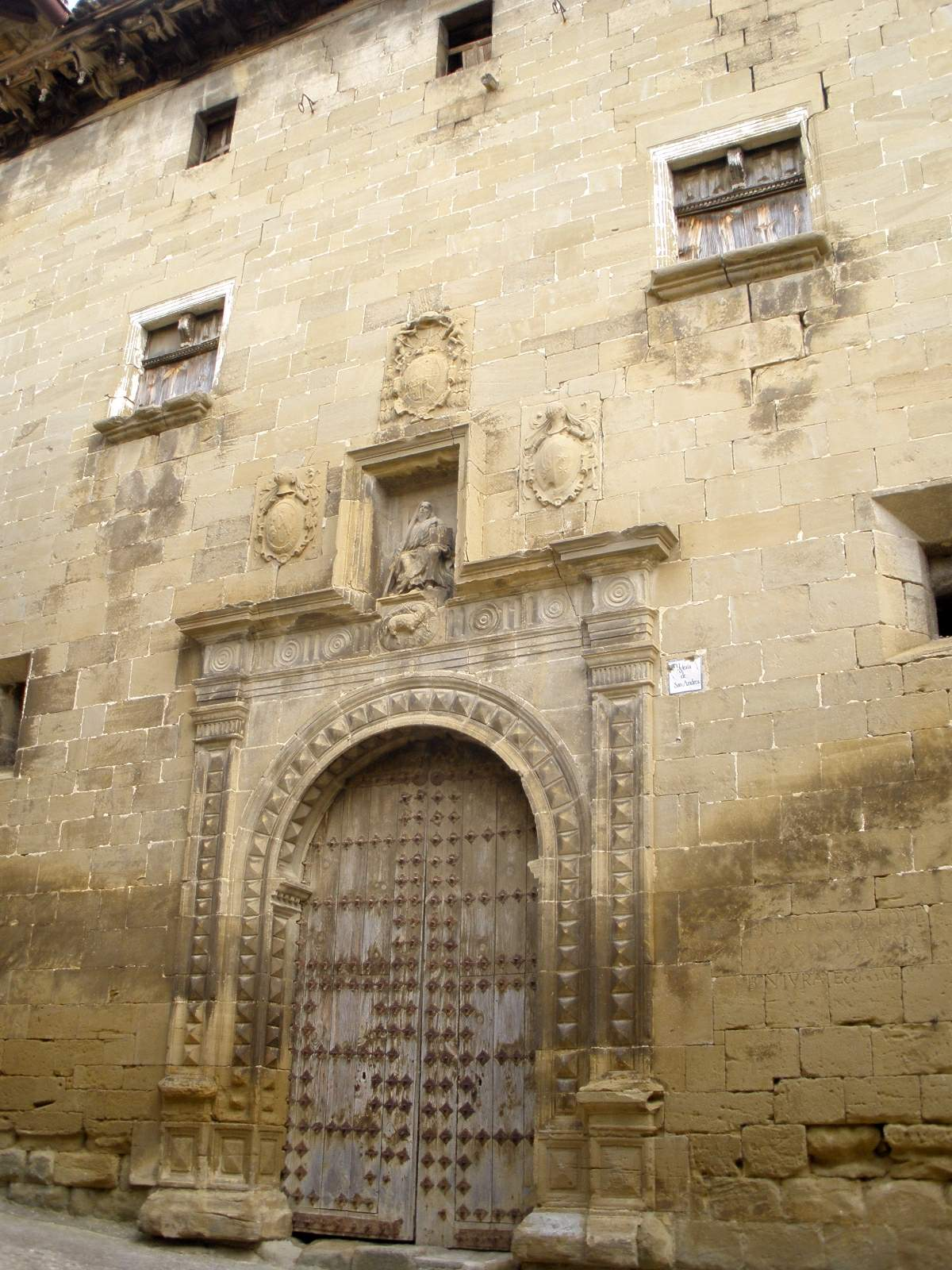 Iglesia de San Andrés, en Uncastillo (Zaragoza)